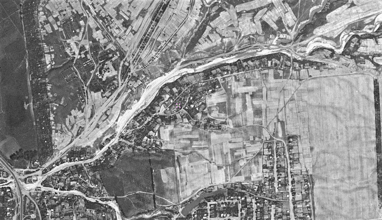 Казань, Танковый овраг в районе посёлка Горки